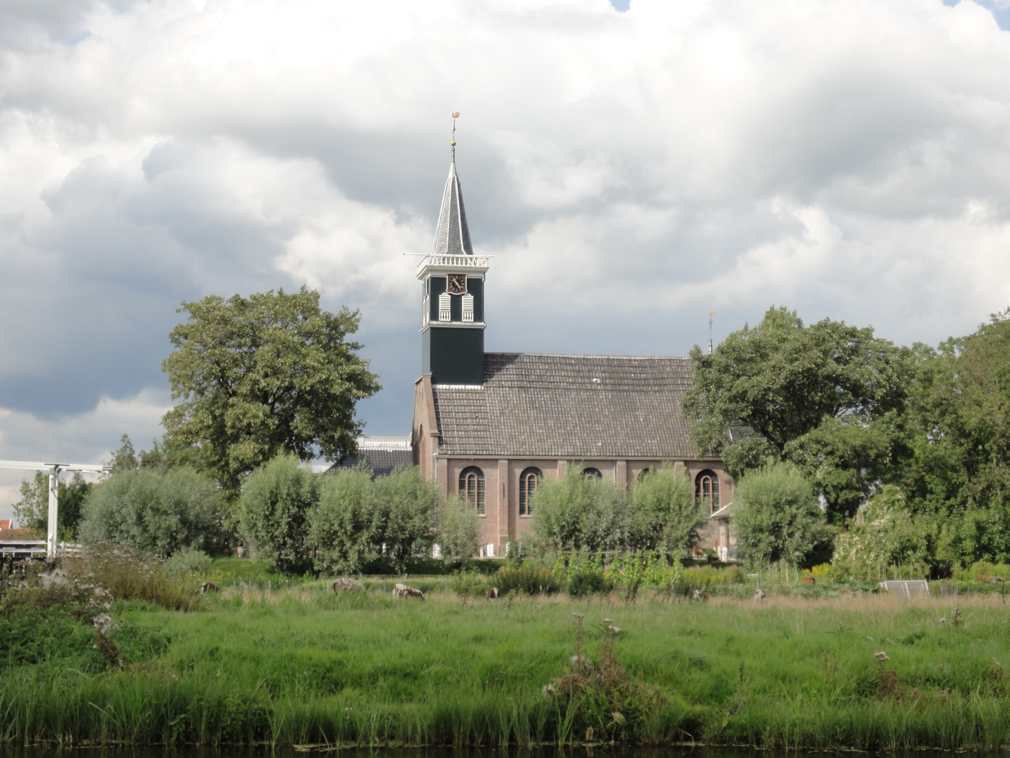 The Church in Grotschermer, NL